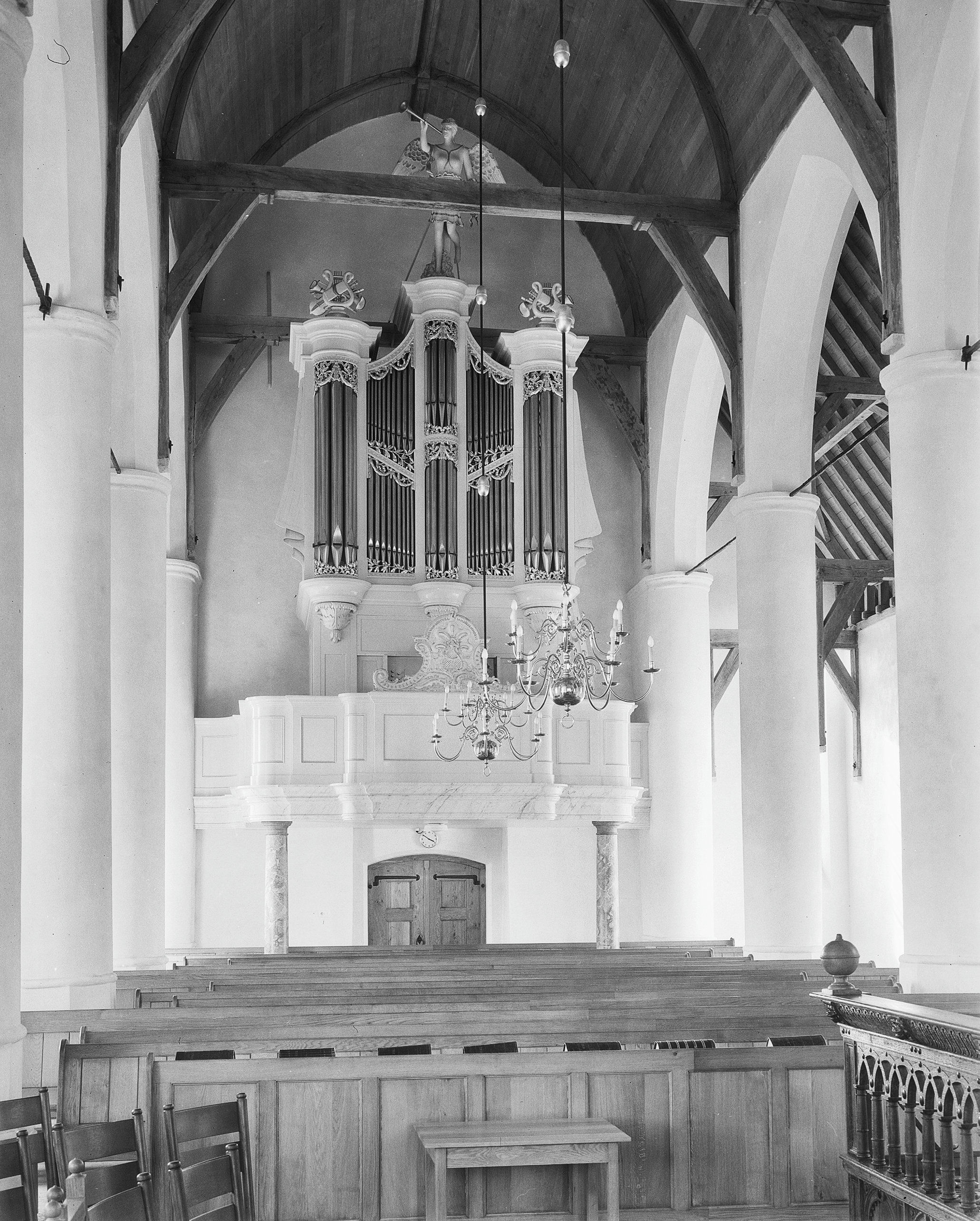 N.H.Kerk: orgel